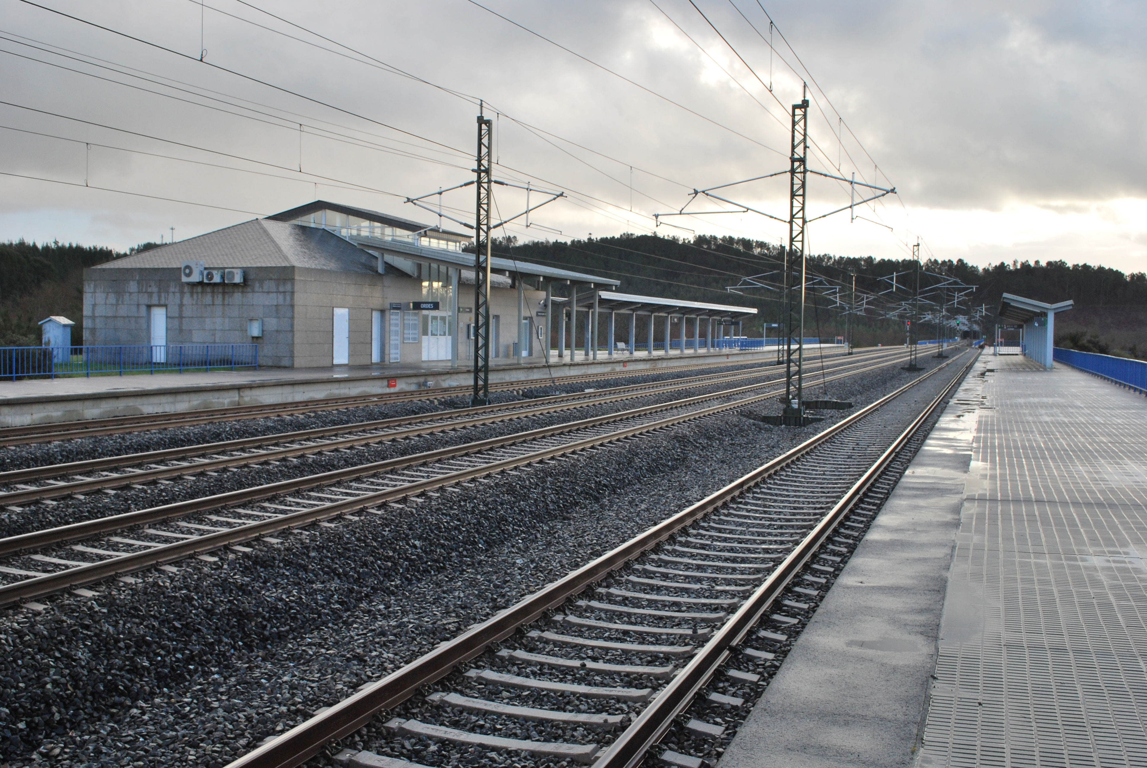 Estación AVE de Ordes, Fosado A Coruña.